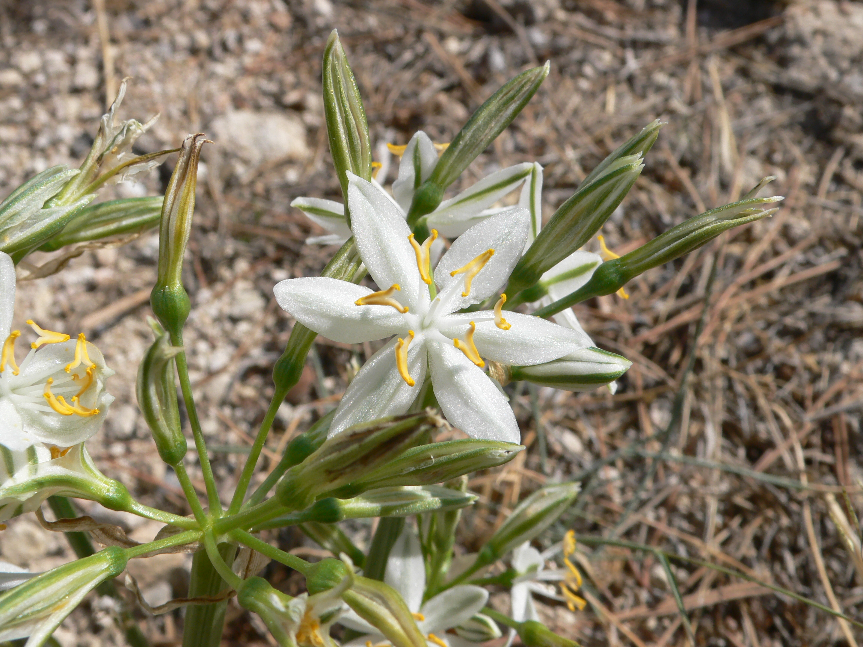 Lapiedra martinezii en el Monte Benacantil de Alicante (España)